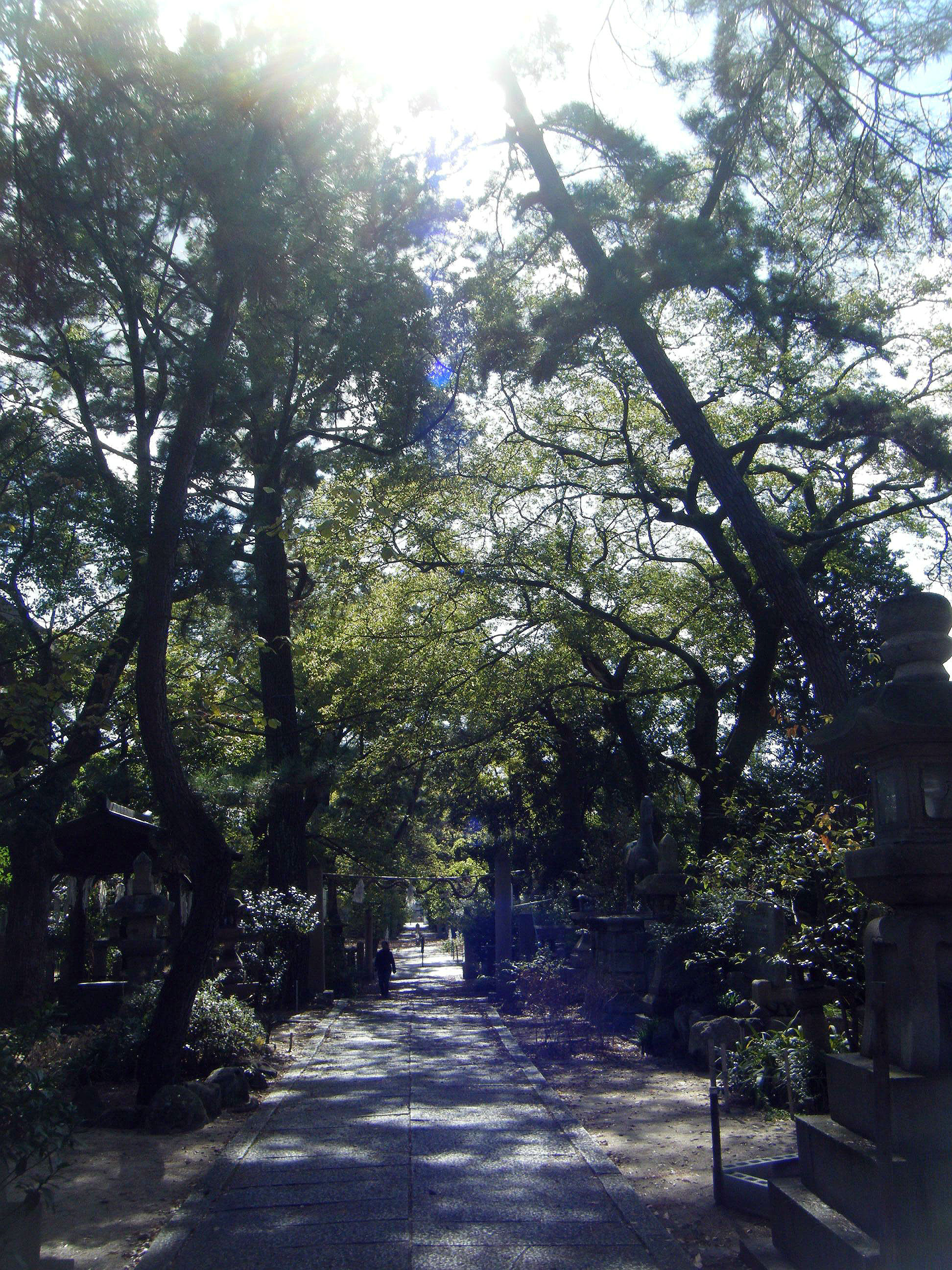 鳴尾八幡神社 参道